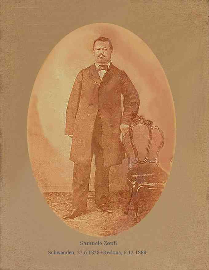 Samuele Zopfi (1828-1888) in una foto studio del 1863